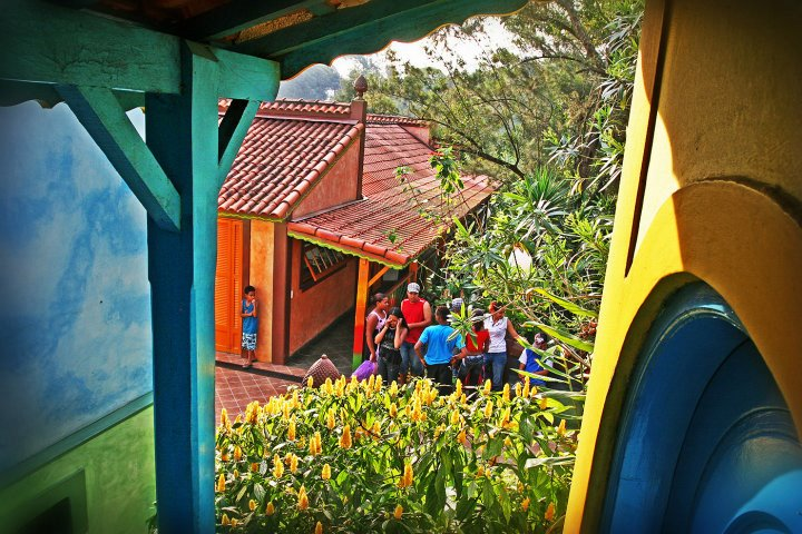 KolibriRedet i Brasil er et unikt sted for barn og unge.